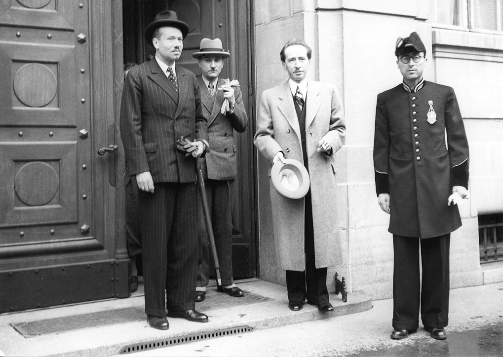 Fürst Franz Josef II. von Liechtenstein beim Verlassen des Bundeshaus nach seinem offiziellen Besuch in der Schweiz. Von links: Fürst Franz Josef II. von Liechtenstein, Bundesrat Marcel Pilet-Golaz, Bundespräsident Enrico Celio, ein Bundesweibel.